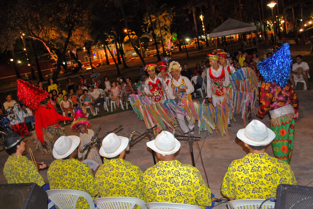 A manifestação cultural do Cavalo-Marinho - Olinda, Pernambuco, Brasil